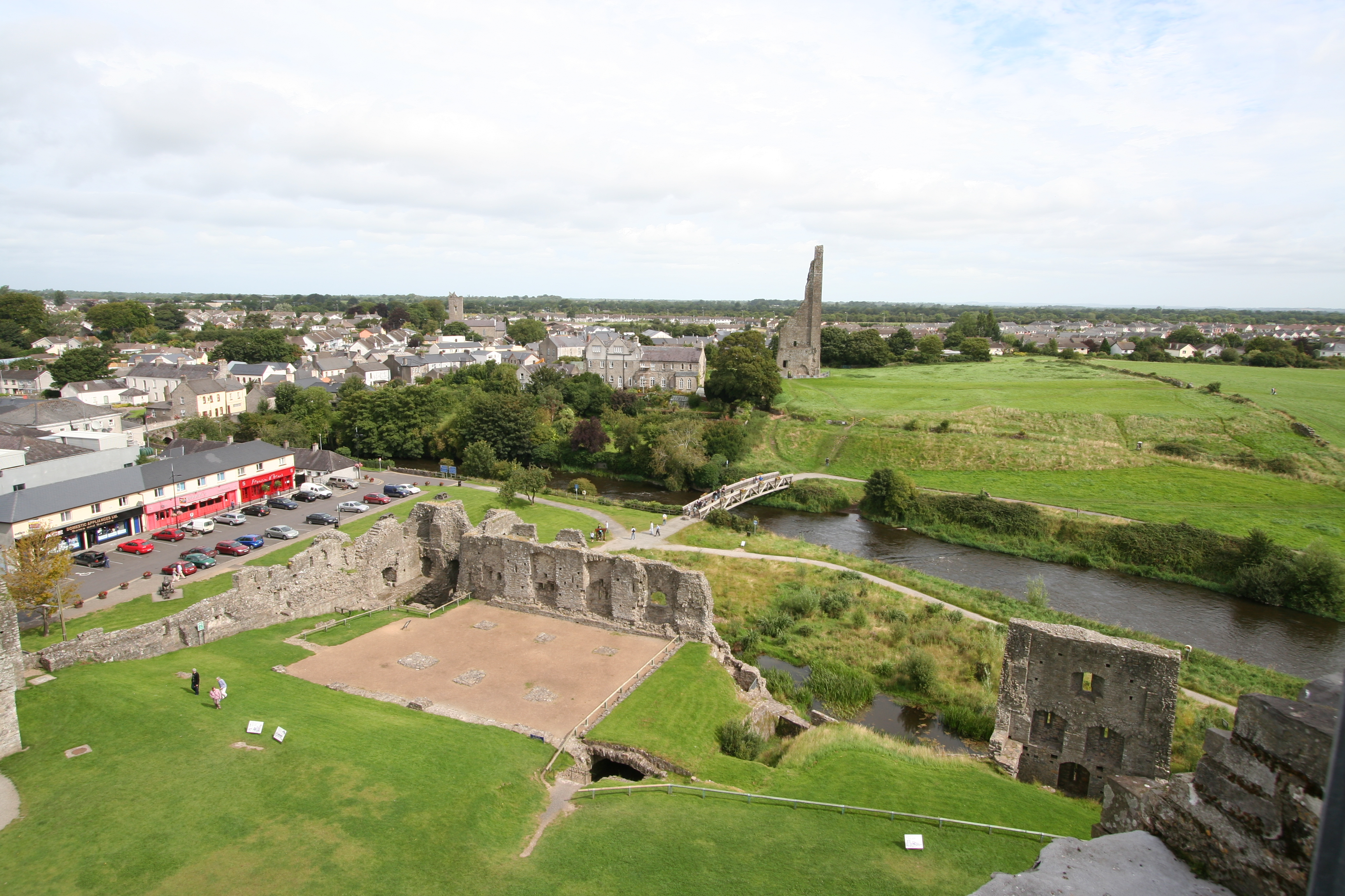 Castillo de Trim